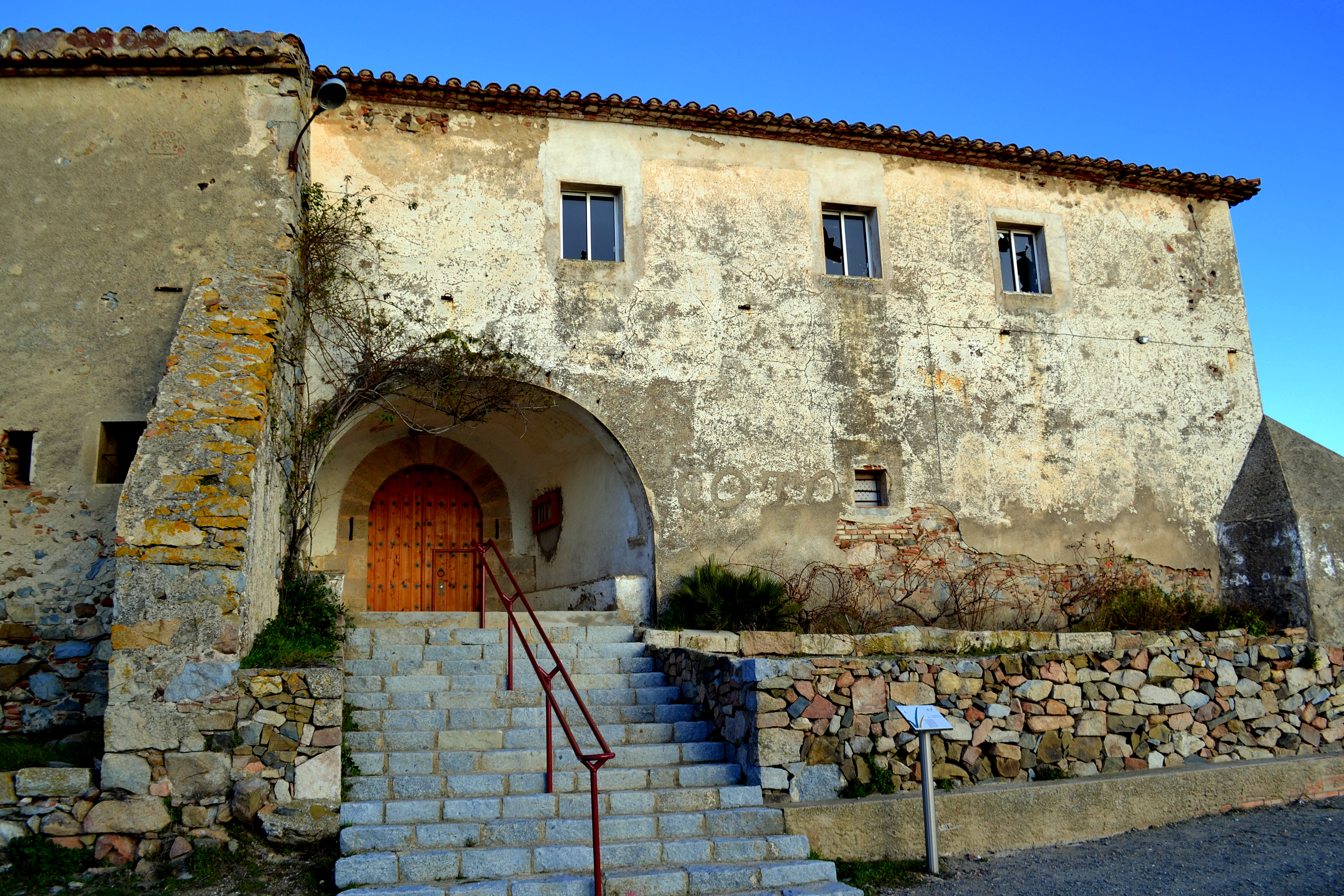 Santuari de la Mare de Déu de Puigcerver (Alforja)